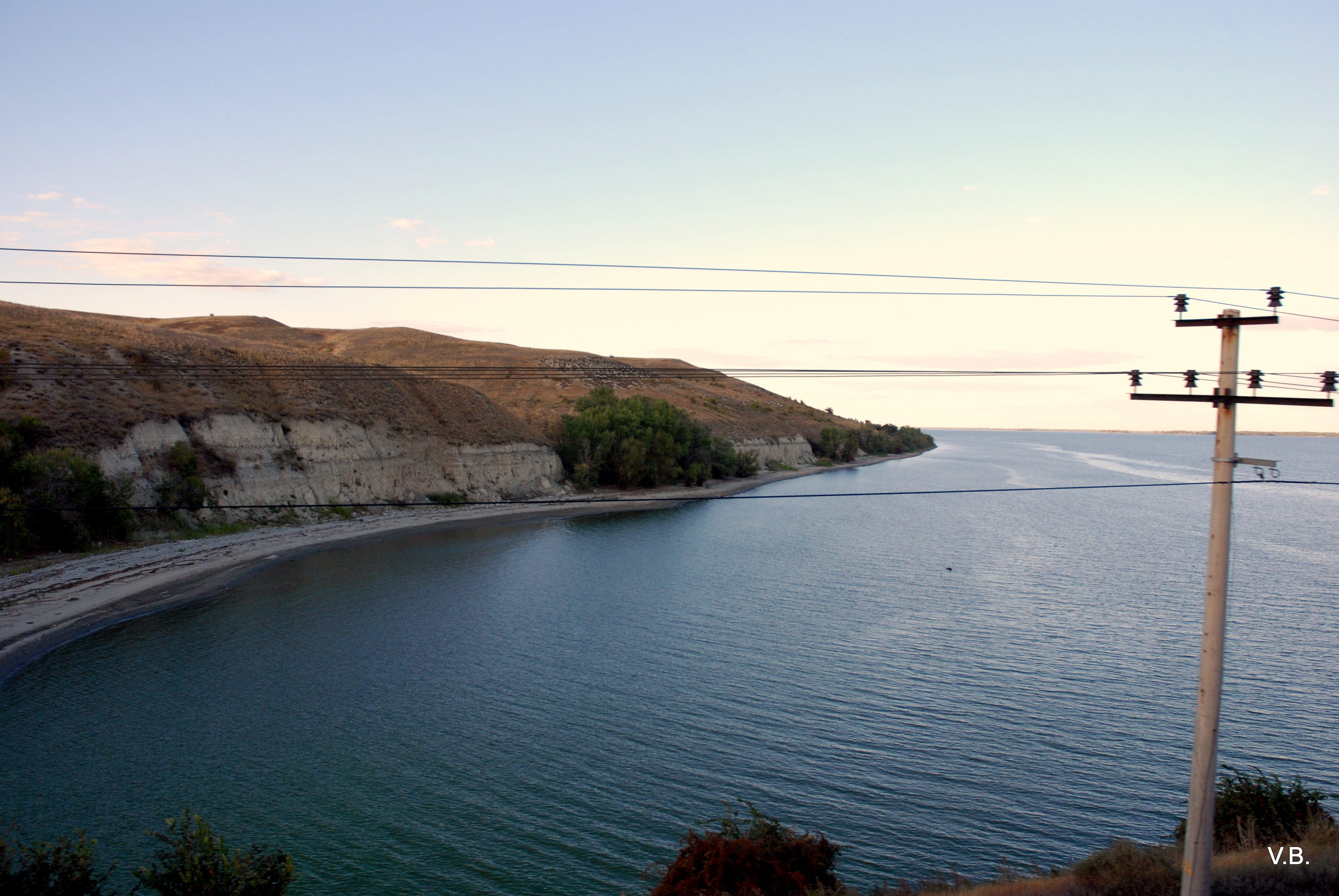 Крутой берег. Фото Виктора Белоусова.